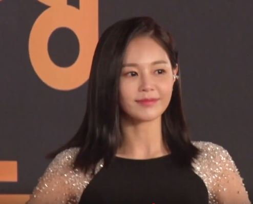 디스패치 구독 클릭! Dispatch Subscribe